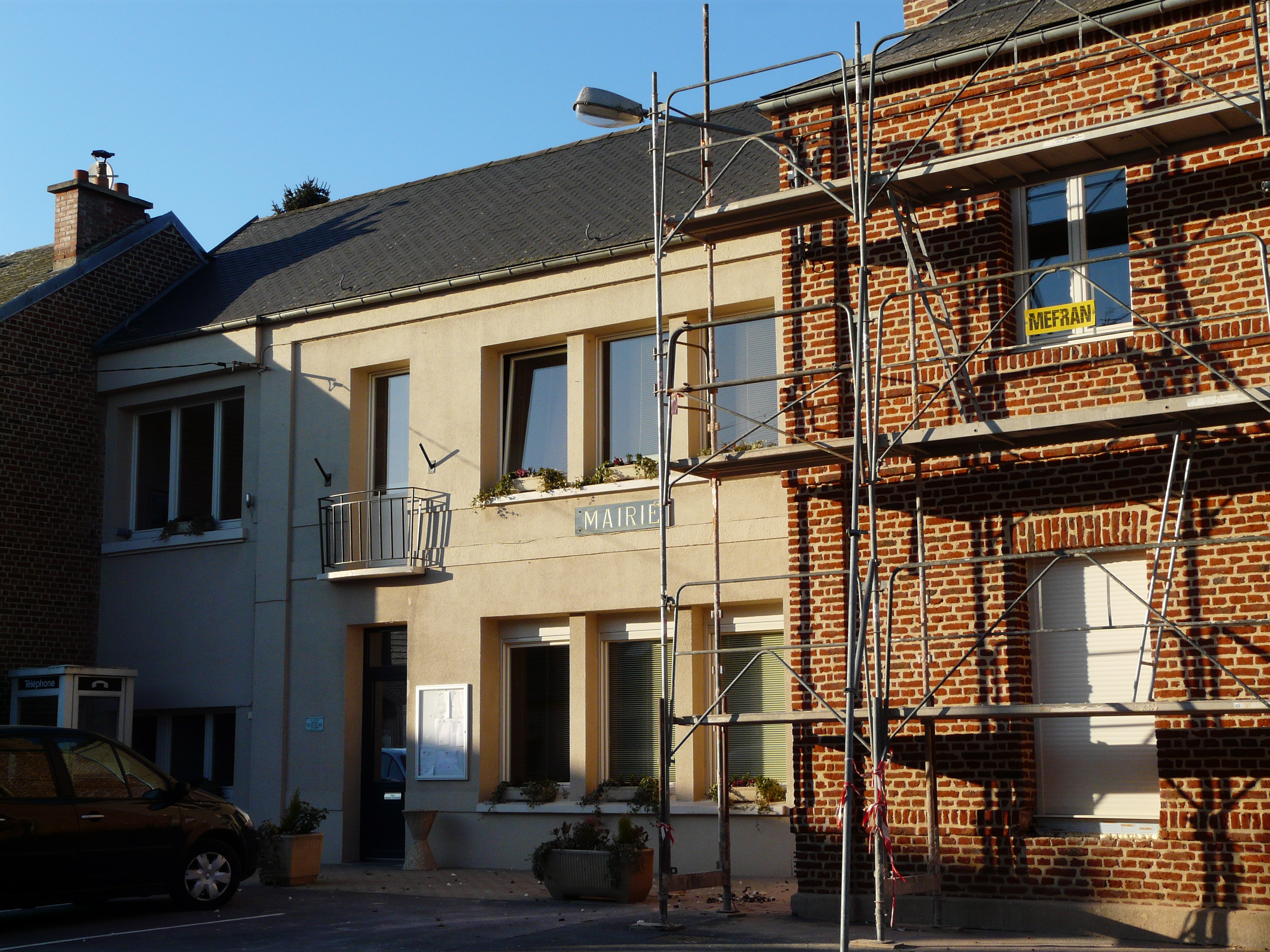 La mairie de Sailly-lez-Cambrai